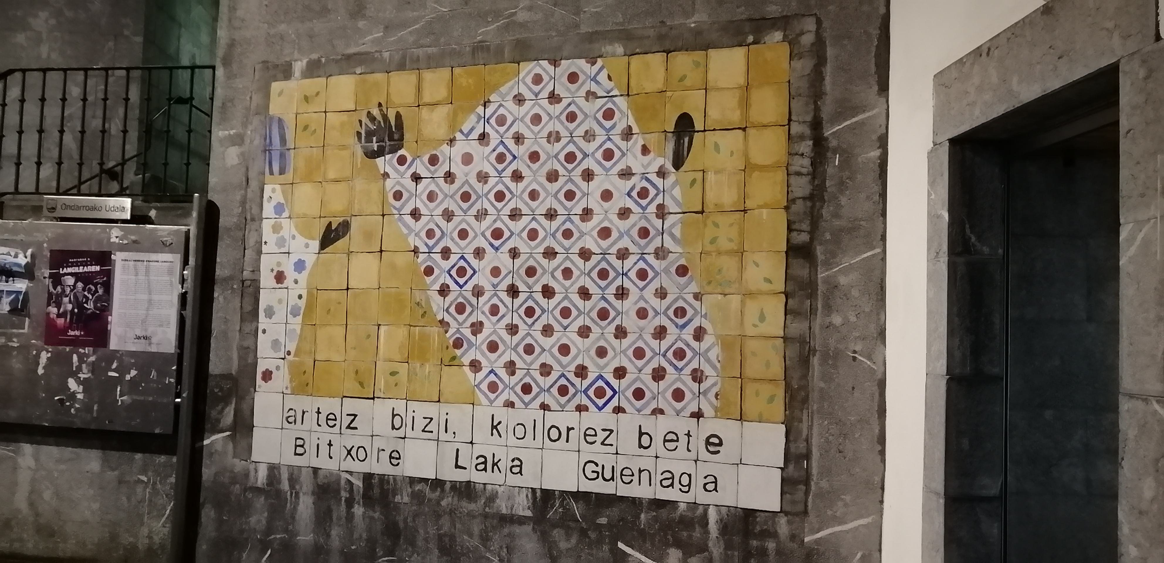 Bitxore Lakaren omenezko mosaikoa Ondarroan